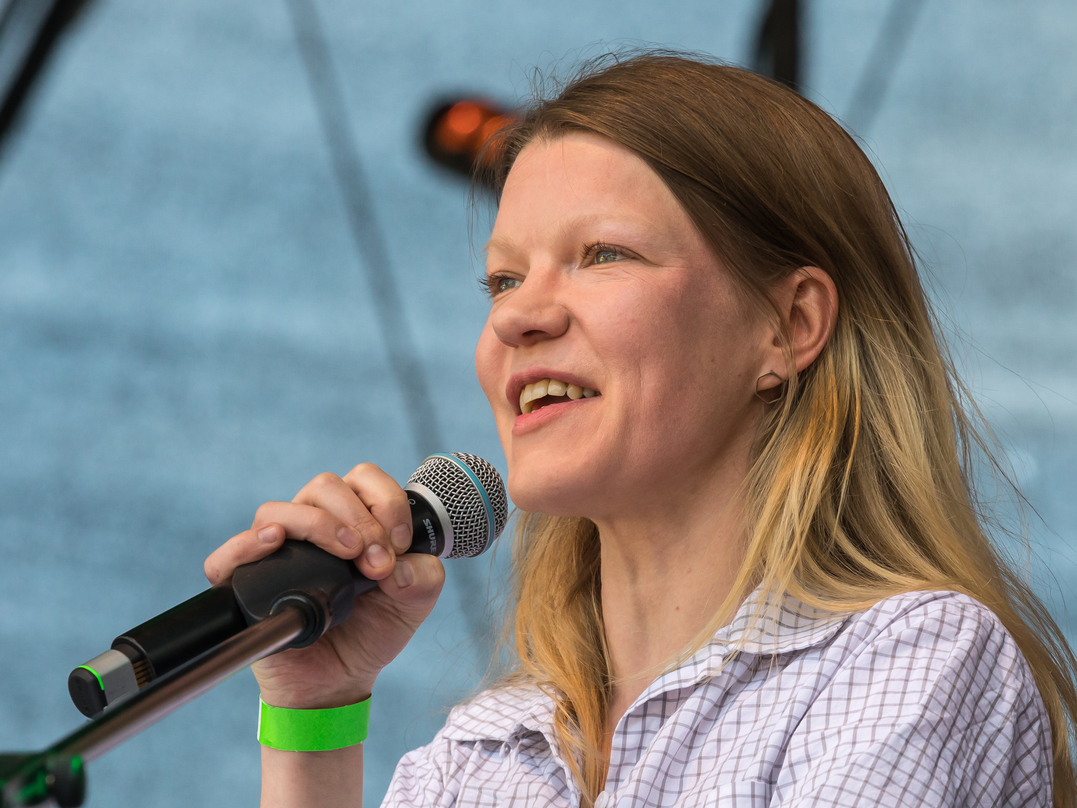 ColognePride/CSD 2018 - Rede von Doris Achelwilm (MdB, Die Linke) auf der Hauptbühne, Heumarkt